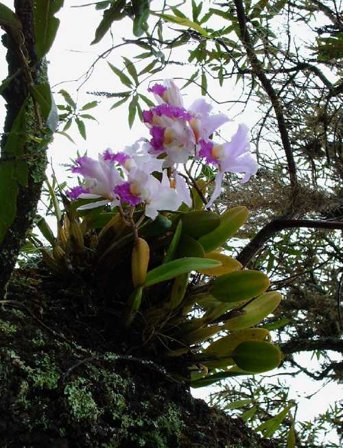 Orquídeas de Soatá